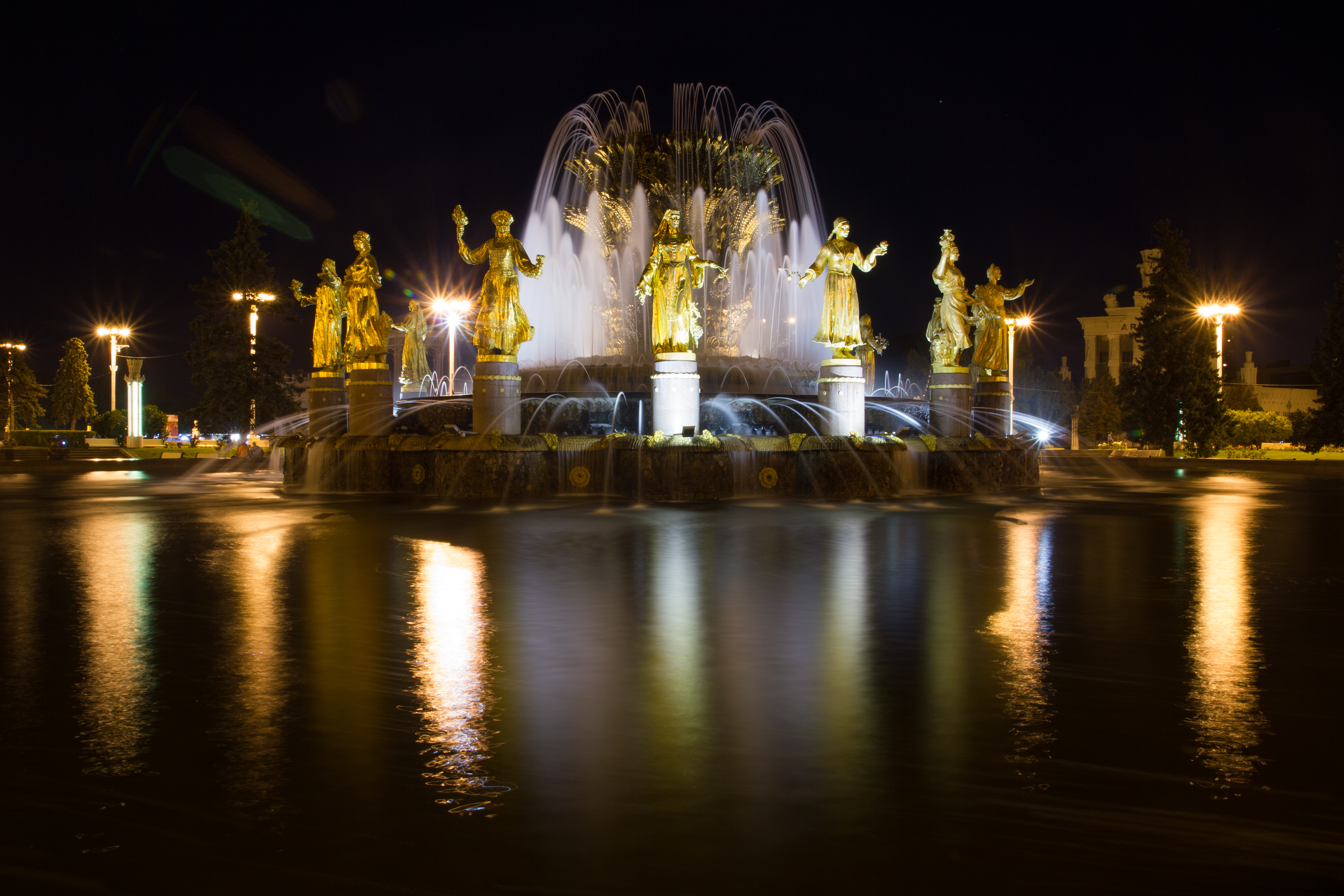 Фонтан Дружба народов: просп. Мира, на территории ВВЦ, Останкинский, Северо-Восточный округ, Москва